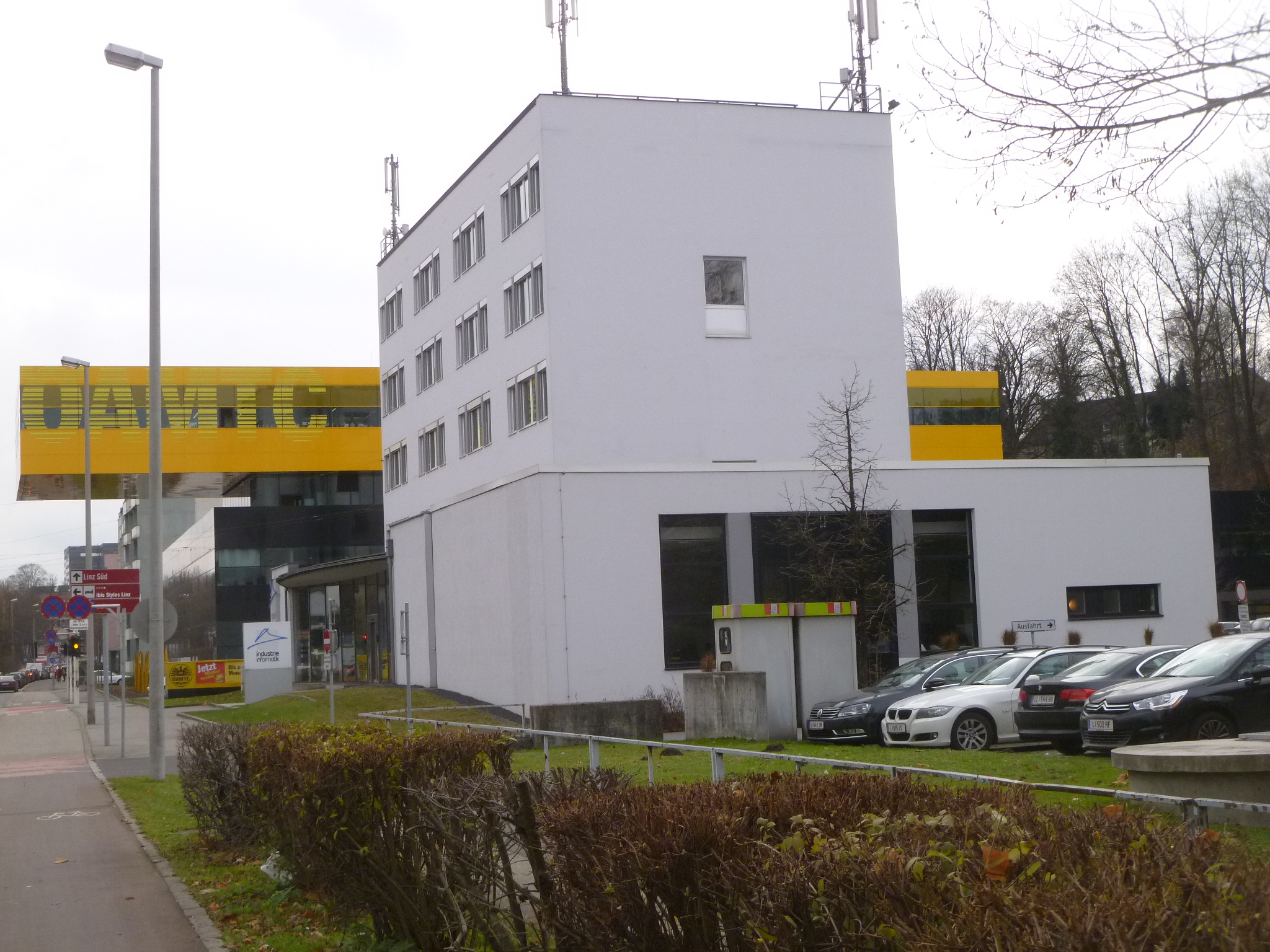 Gebäude des ÖAMTC in der Wankmüllerstraße